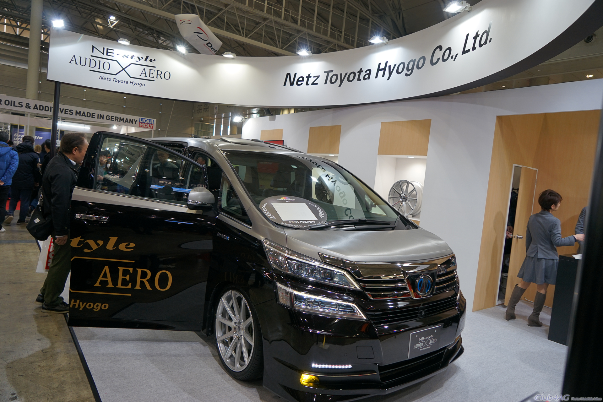 Tokyo Auto Salon 2019